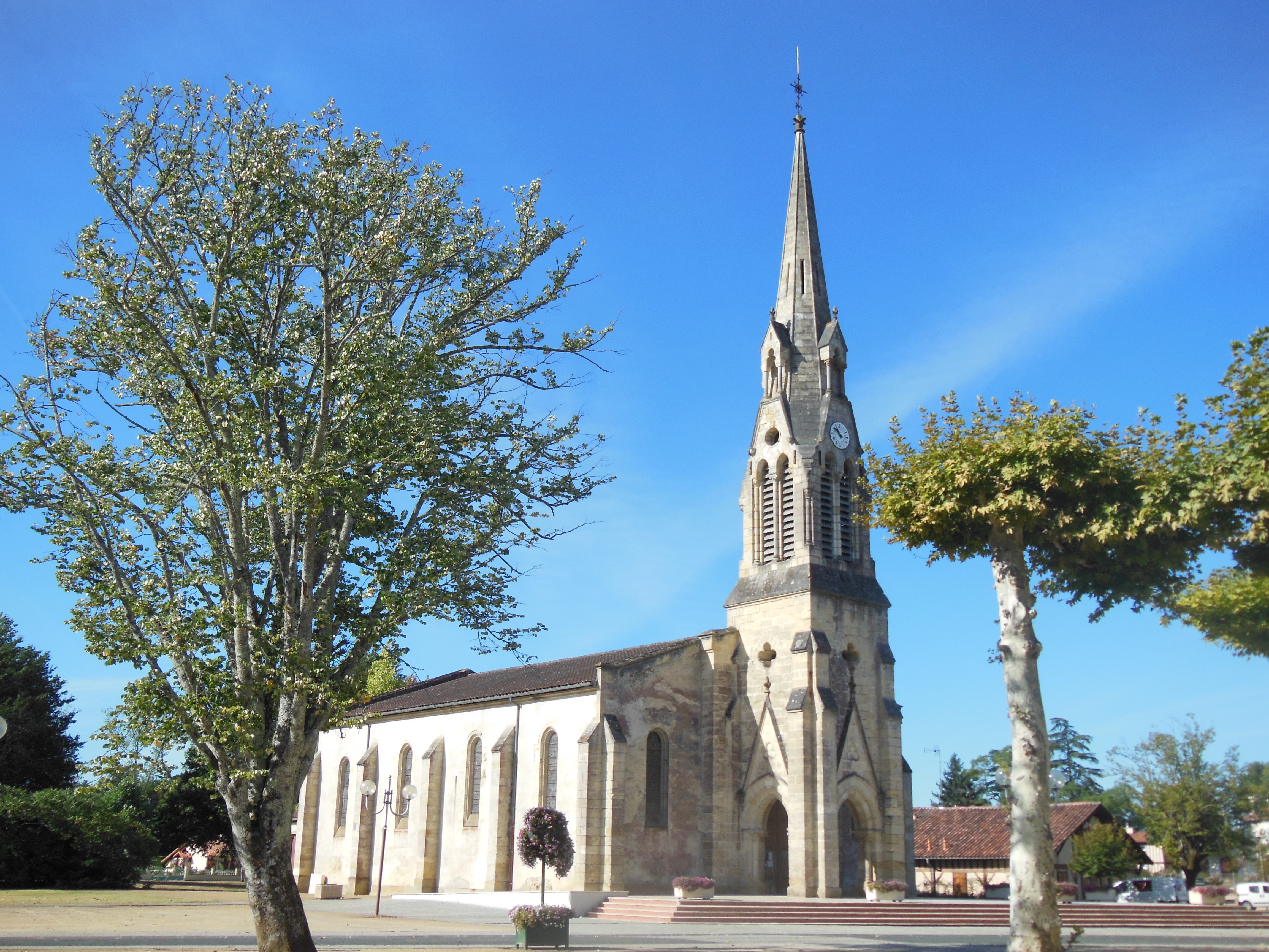 Église Saint-Pierre de Morcenx-Bourg, dans le département français des Landes